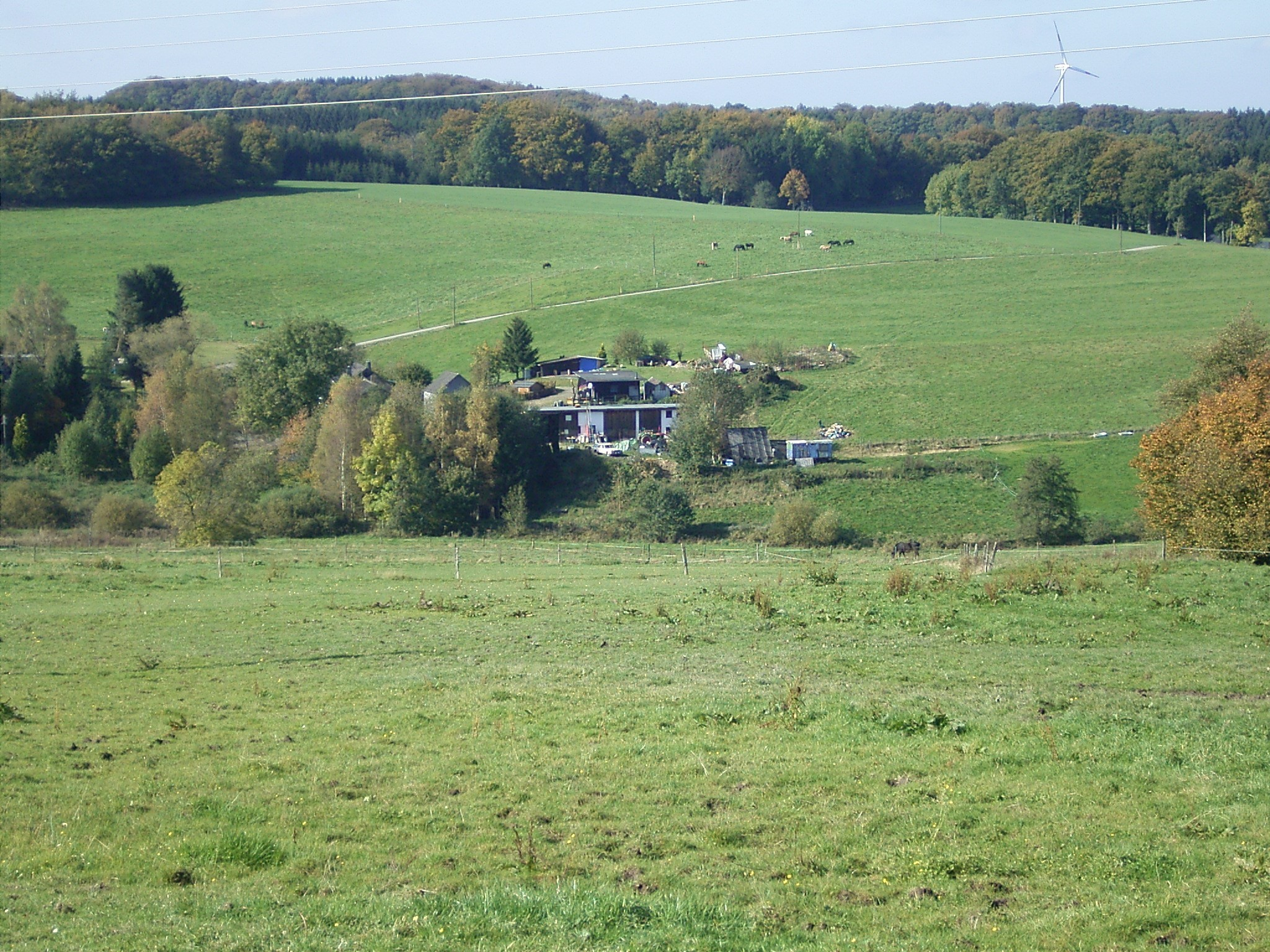 Radevormwald